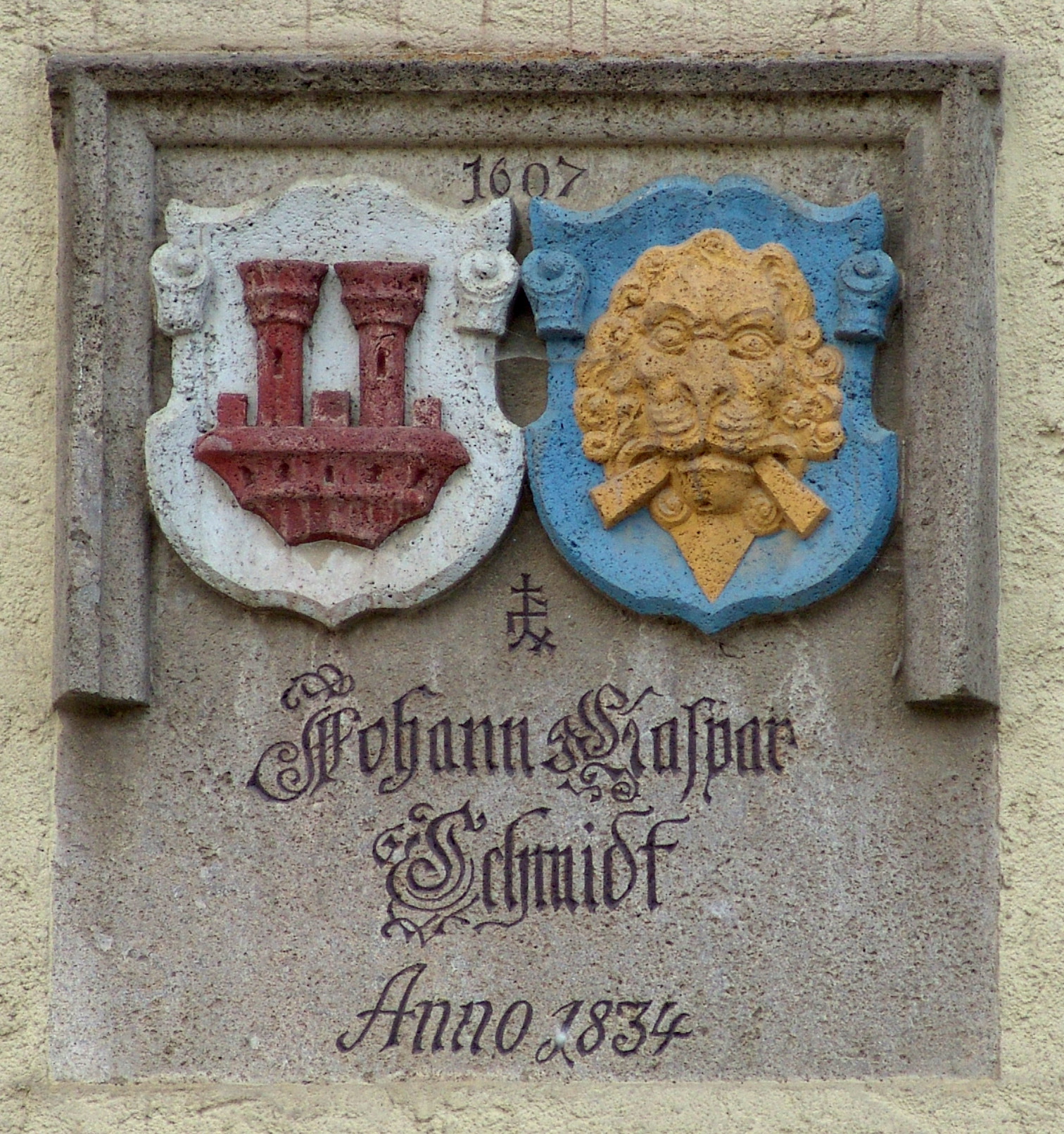 Großharbach, Landturm der Rothenburger Landhege